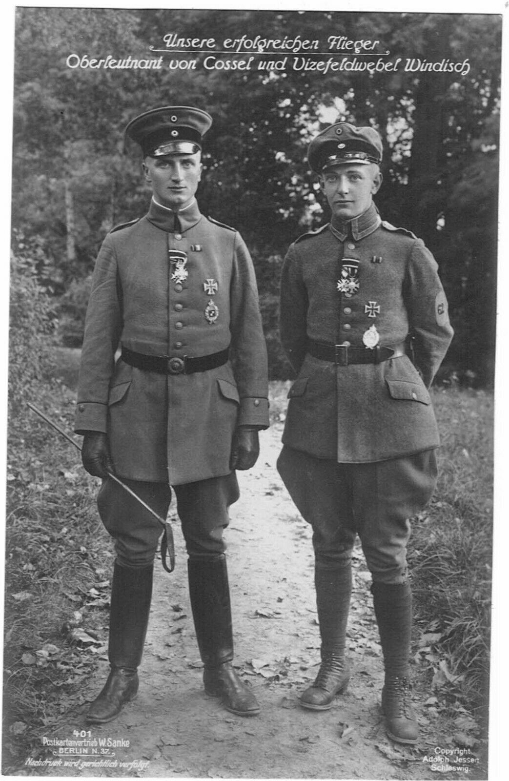 Maximilian von Cossel (1893-1967), Oberst der Luftwaffe; hier abgebildet als Oberleutnant